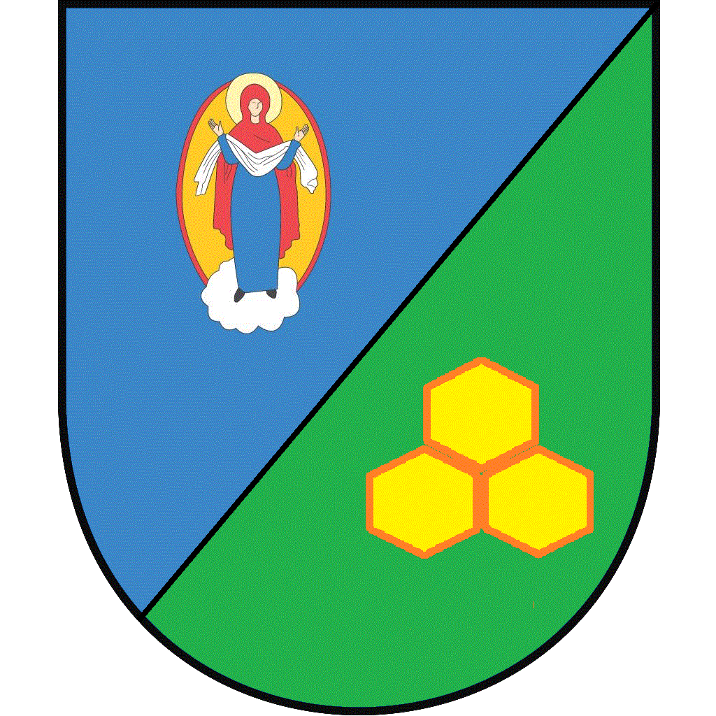 Не афіційны герб Свіслачы.